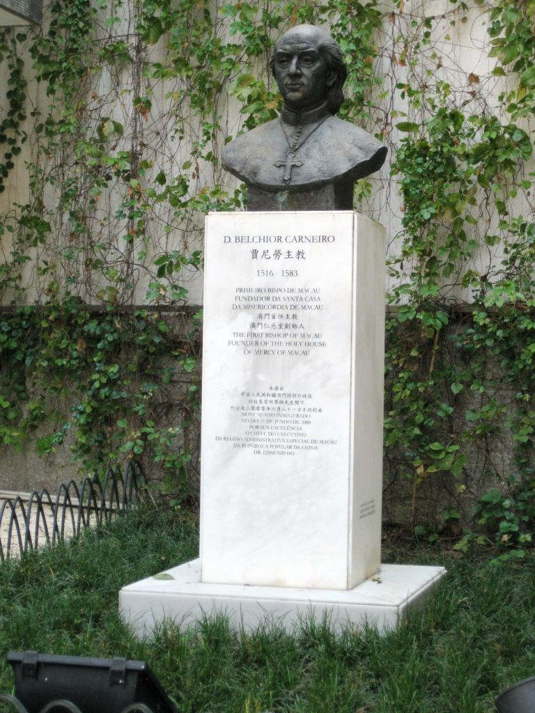 在澳門仁慈堂的賈尼勞主教像